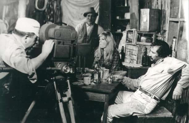 Filmación de "Mina Alaska" del cineasta boliviano Jorge Ruiz (1960)